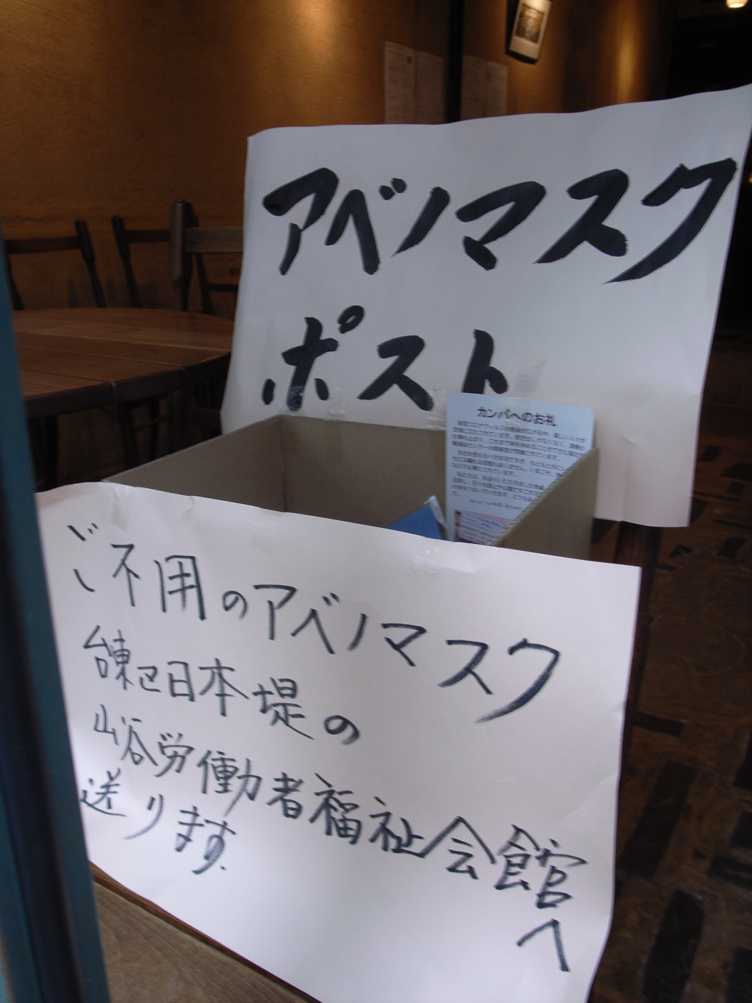 浅草のカフェ「ギャラリー・エフ」に設置された不要のアベノマスクを回収する善意のポスト。